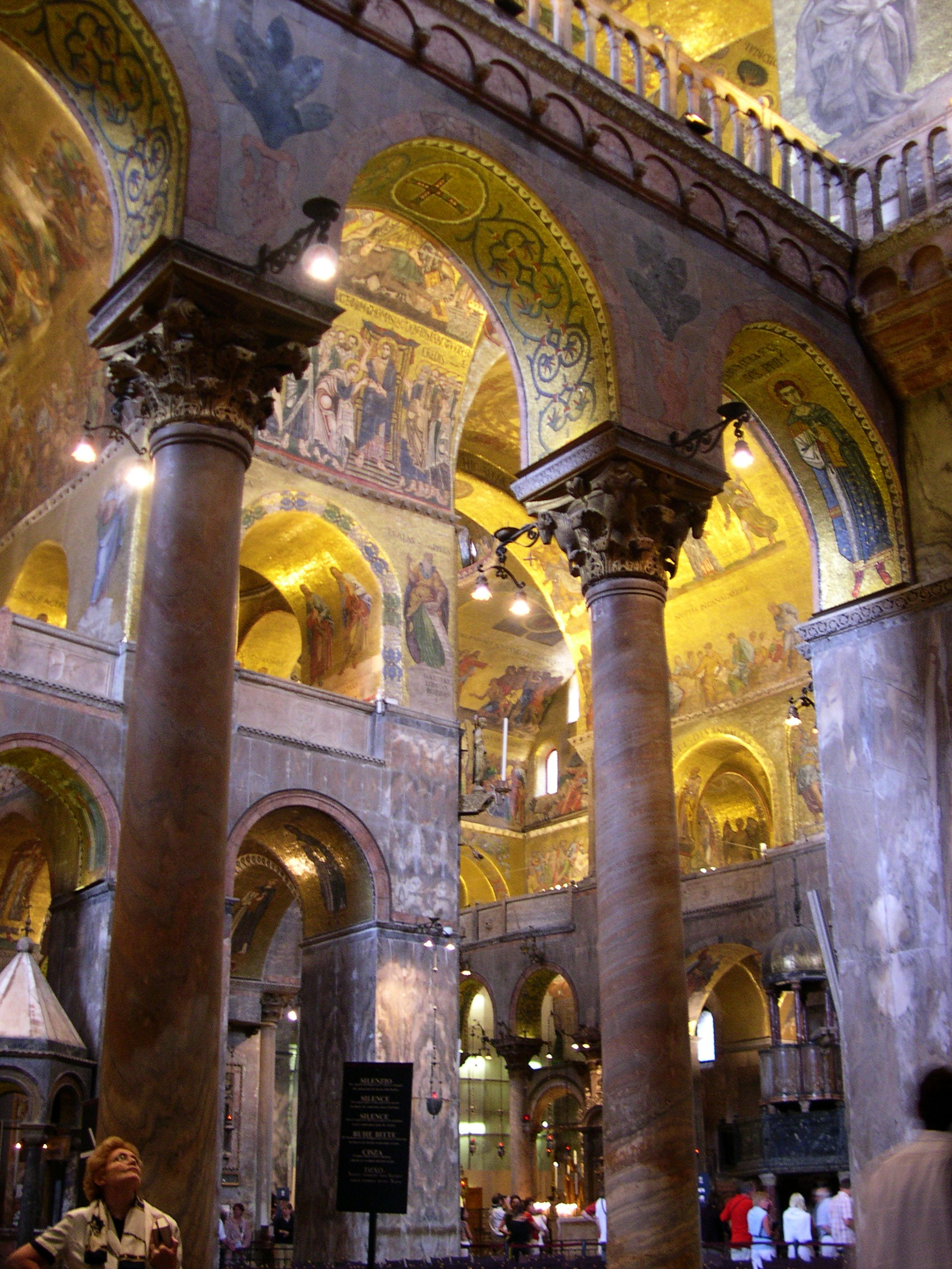 Basilique Saint Marc, intérieur